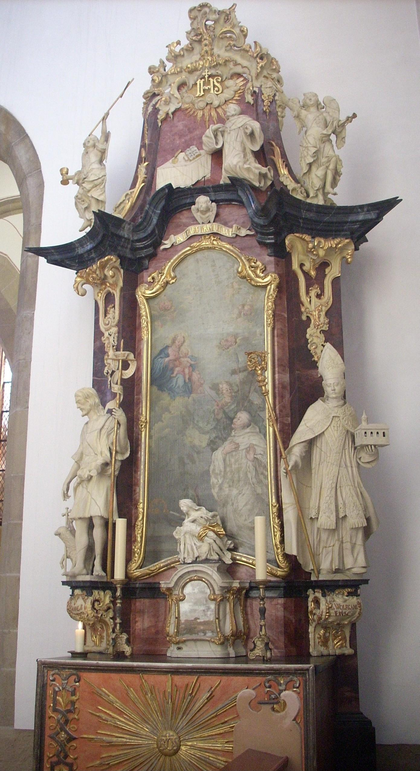 Kloster Marienrode, St. Michael, Barockaltar im südlichen Seitenschiff